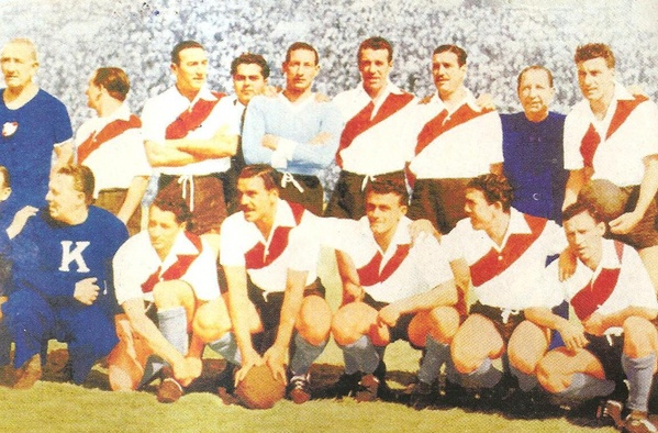 Campeón 1947. Arriba: Yácono, Vaghi, Grisetti, Ferreyra, Ramos y Rossi. Abajo: Reyes, Moreno, Di Stéfano, Labruna y Loustau.